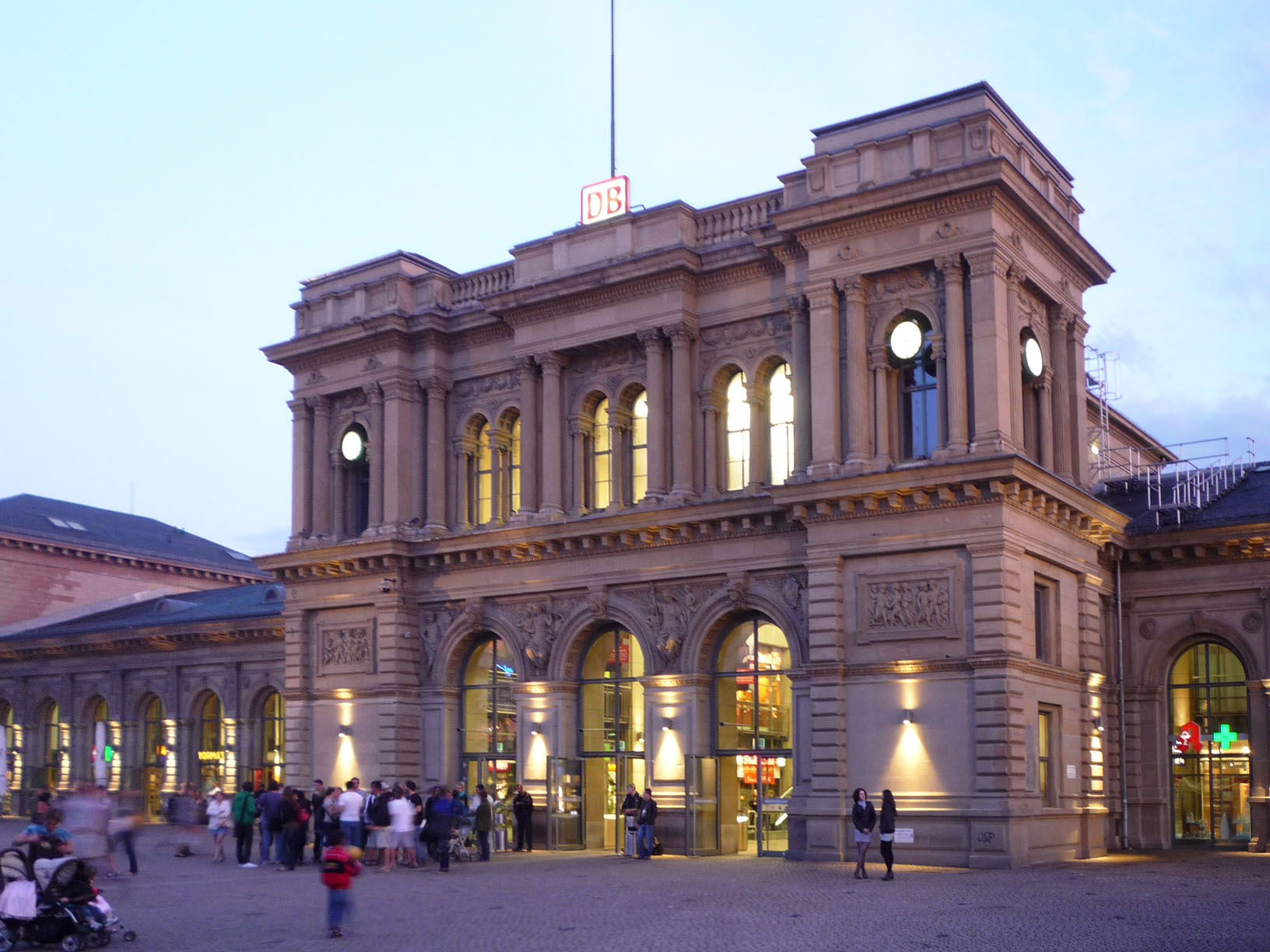 Haupteingang des Mainzer Hauptbahnhofs